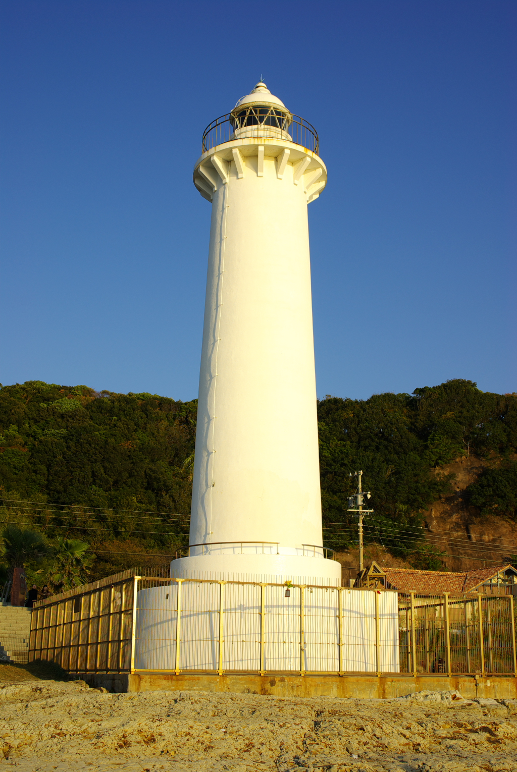 海側から見た野間崎灯台